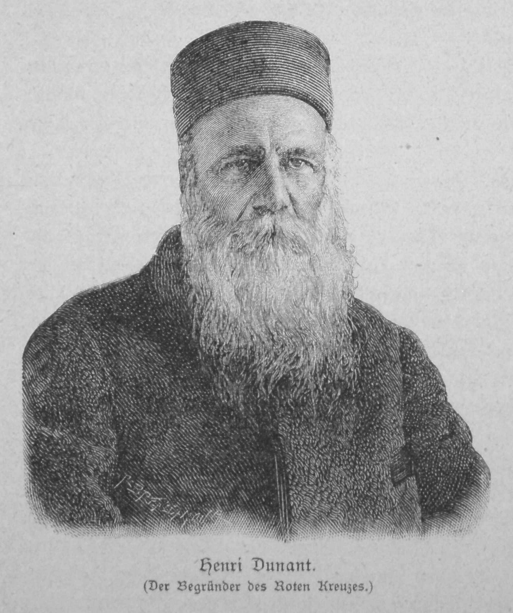 Henry Dunant